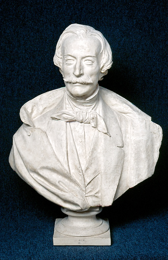 Busto di Massimo D'Azeglio eseguito da Vincenzo Vela